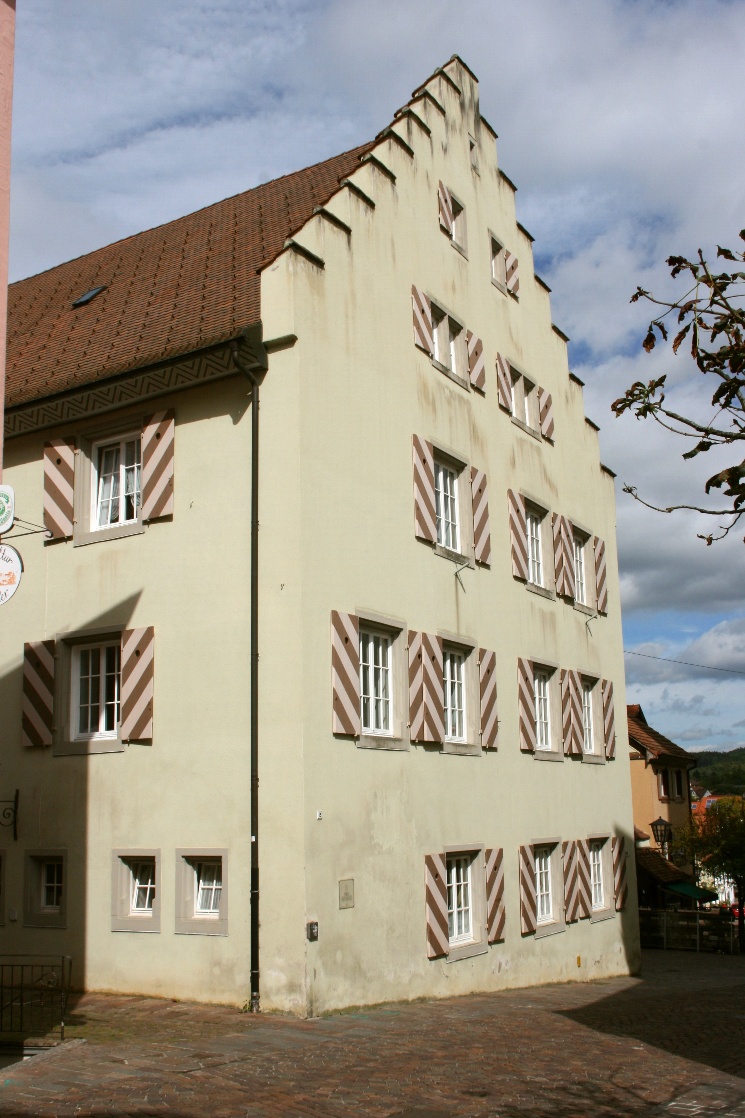 Katholisches Pfarrhaus, Hauptstraße 2 in Engen